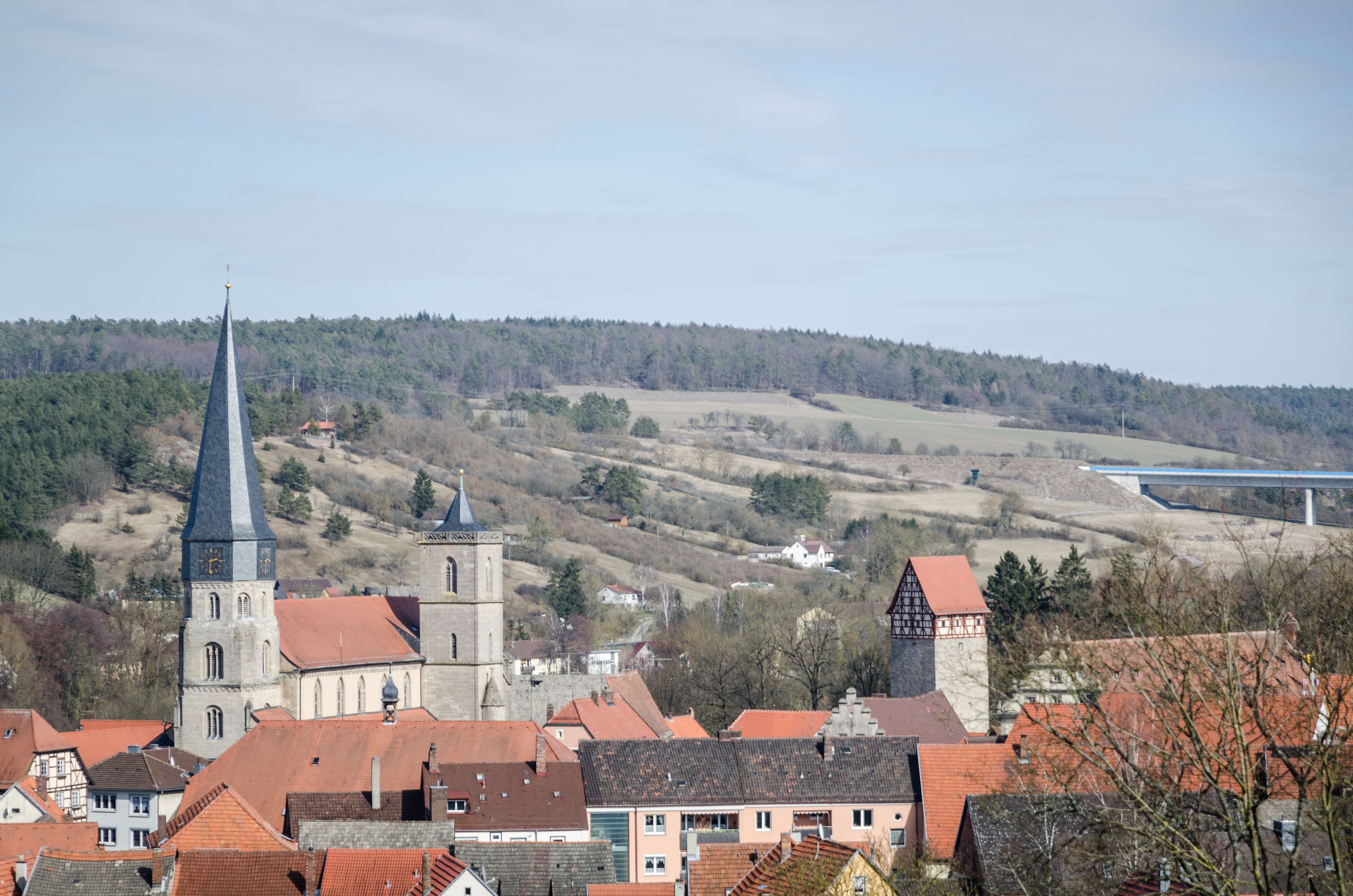 Münnerstadt von Westen, kath. Pfarrkirche, Oberes Tor